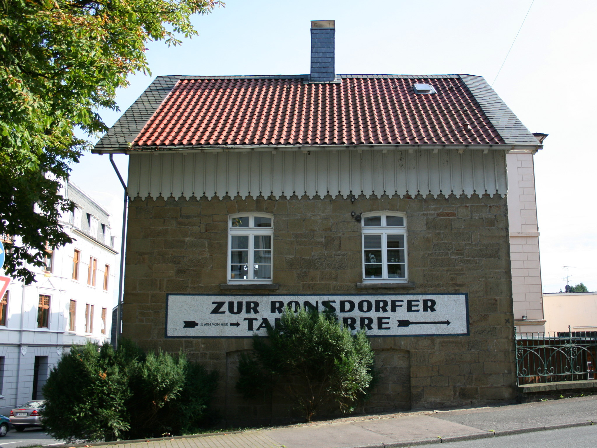 Wuppertal-Ronsdorf, Innenstadt